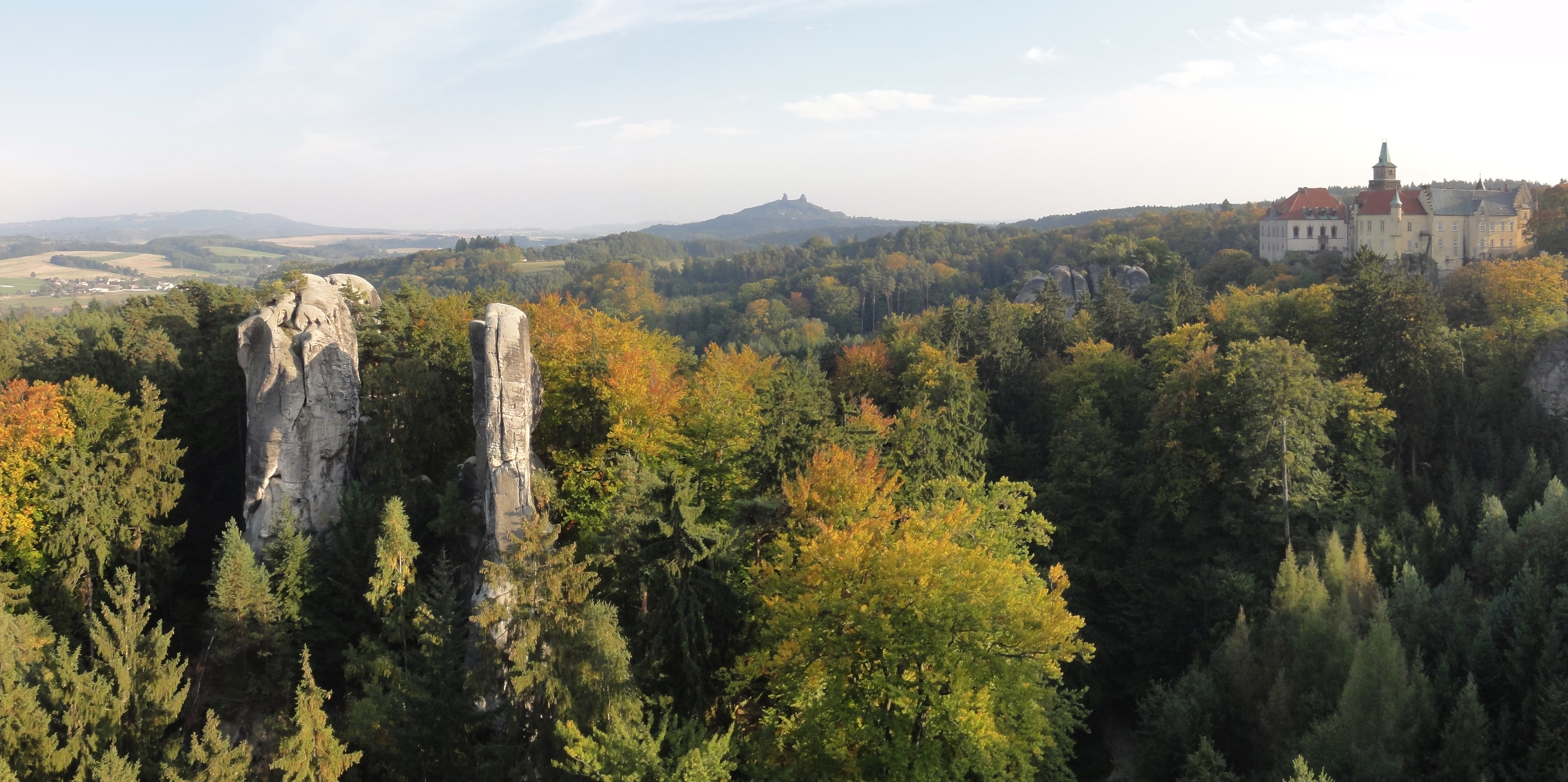 výhled (zleva: Daliborka, v pozadi Velky Kapucin, Kniha, uprostred na horizontu Trosky, vpravo zamek Hruba Skala)